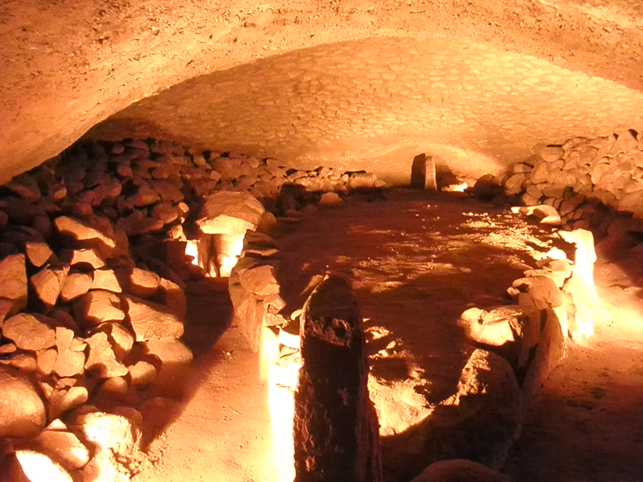 Lugnaro Schiffsetzung: rekonstruierte Schiffsetzung innerhalb eines Grabhügels.